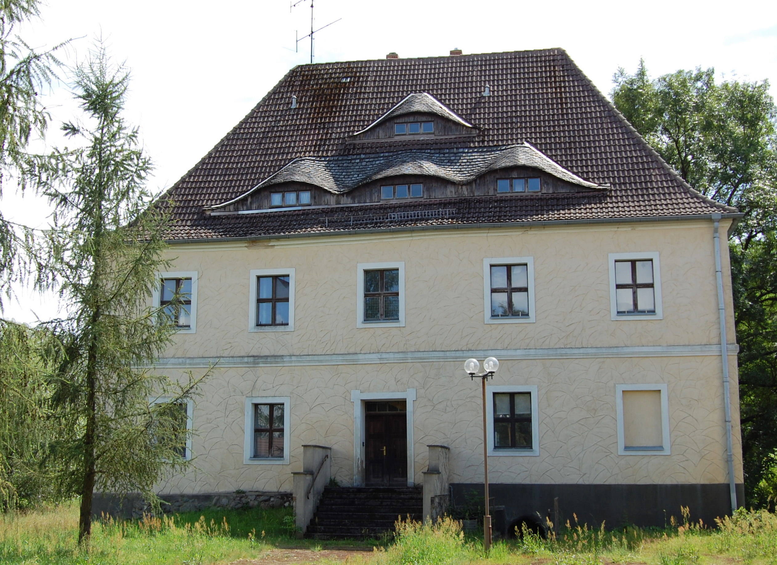 Gutshaus in Neu Zauche, Vorderseite